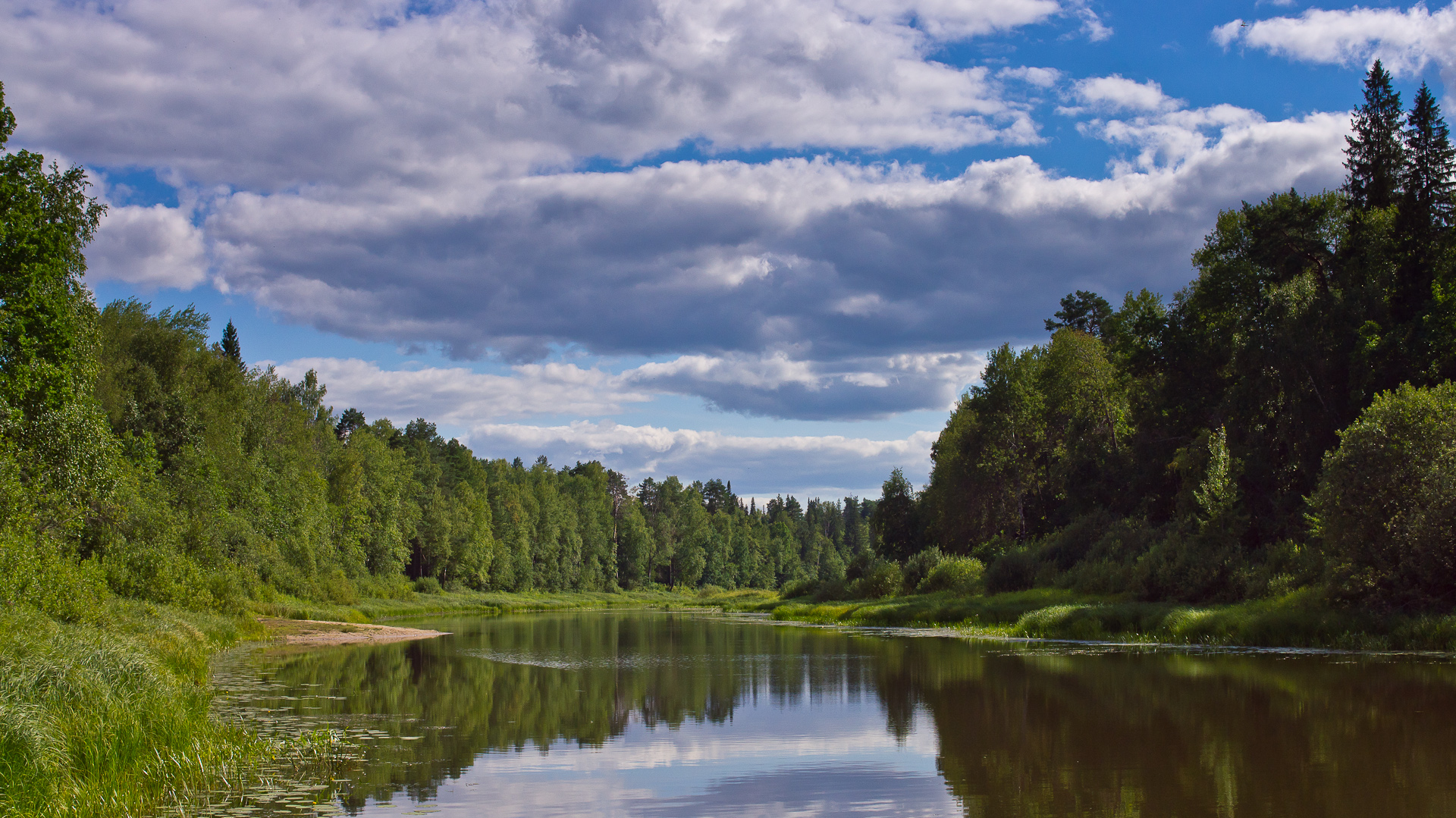 Калмово озеро